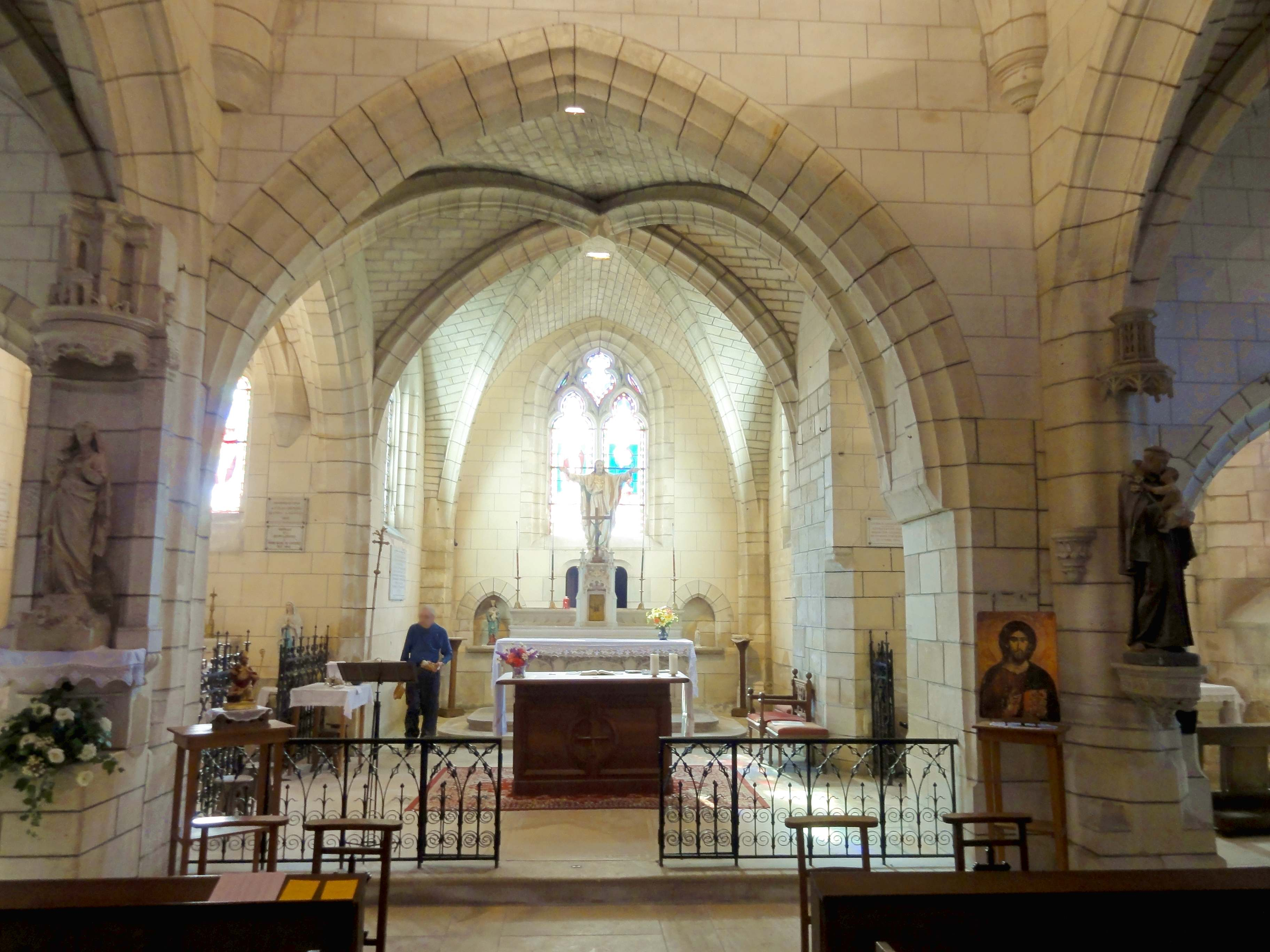 Clé de voûte (voir titre).